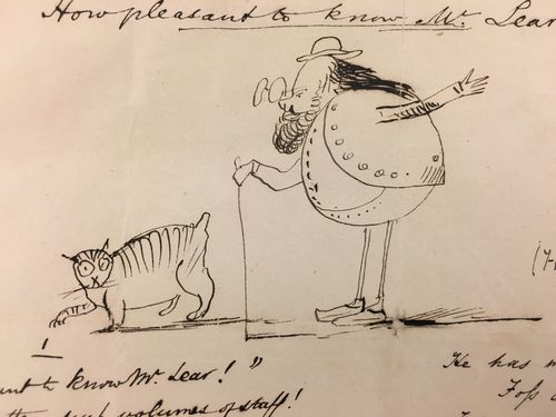 愛德華·利爾與貝文副主教通信中的插圖，現藏於大英圖書館。